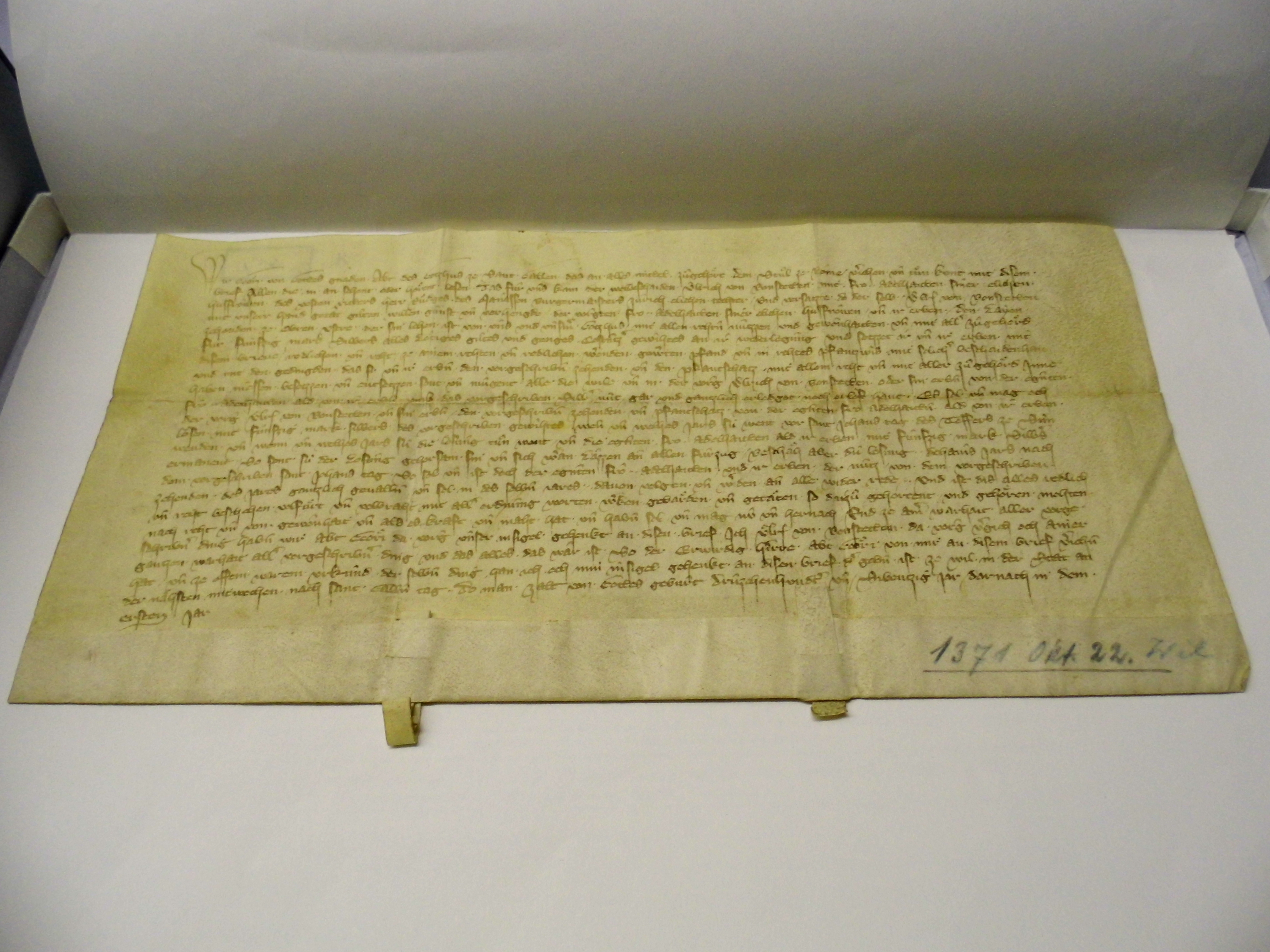 Hier beurkundet Abt Georg von St. Gallen, dass Ulrich von Bonstetten seiner Gemahlin Adelheid den Laienzehnten zu Oberuster, Lehen vom Kloster, verpfändet hat.